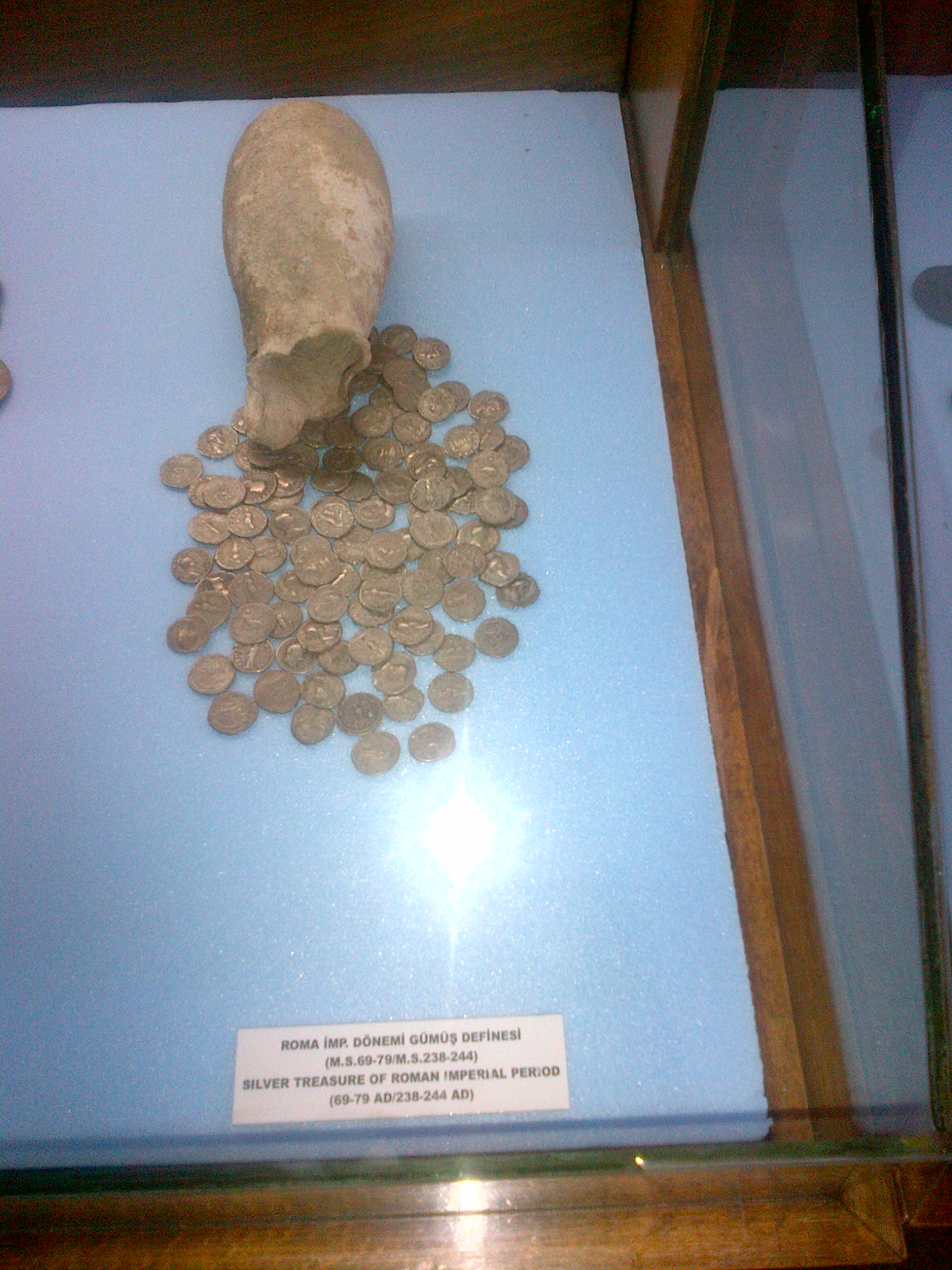 Monedas de plata del Imperio romano en el Museo Arqueologico de Samsun, Turquia.